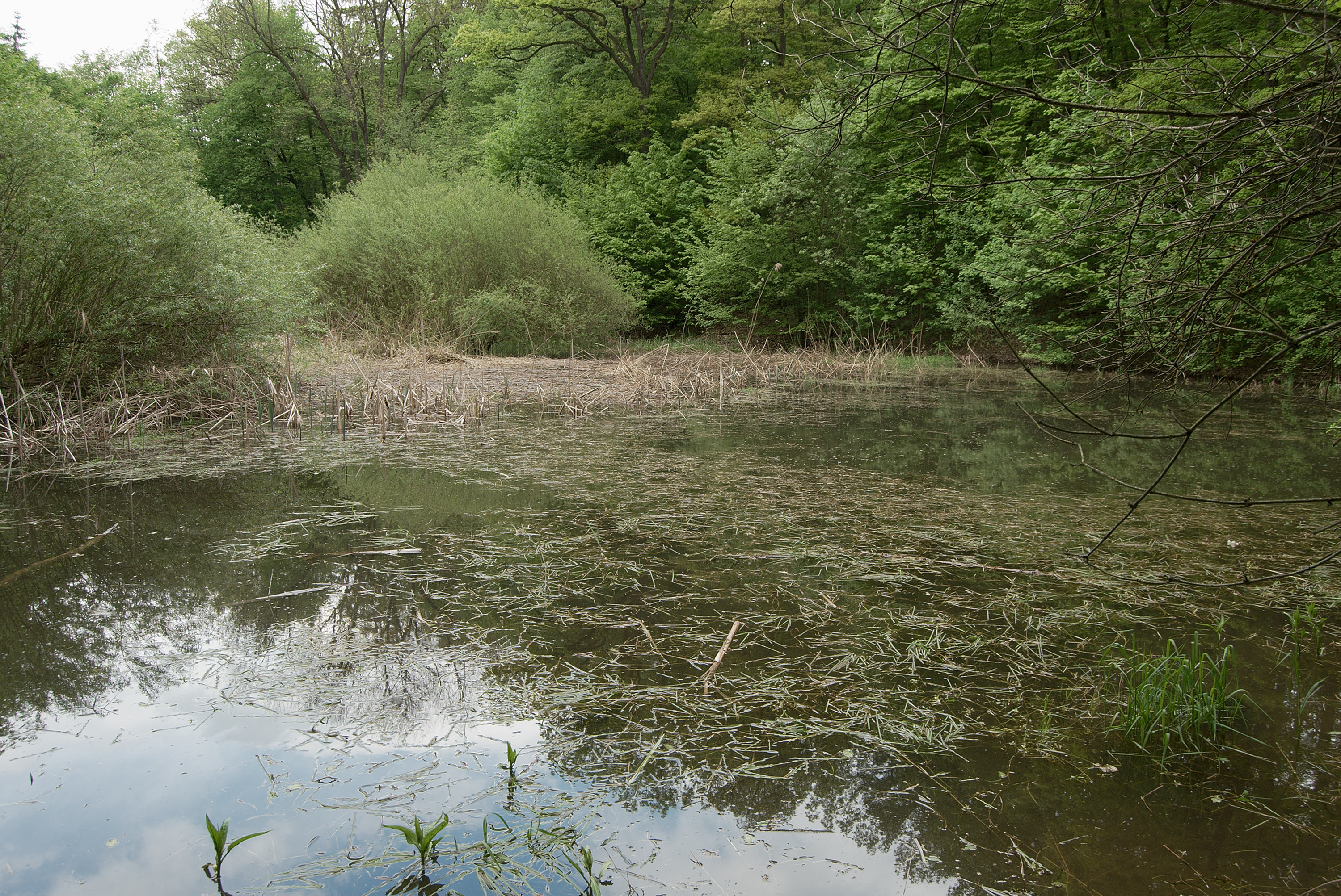 Česky: Brno-Sadová - jezírko na Zaječím potoce na 49°14'13.069" s.s., 16°36'27.244" v.d.